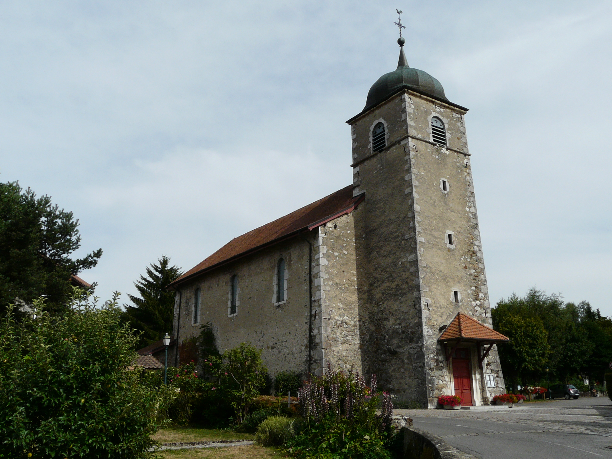 Champanges (Haute-Savoie) : l'église